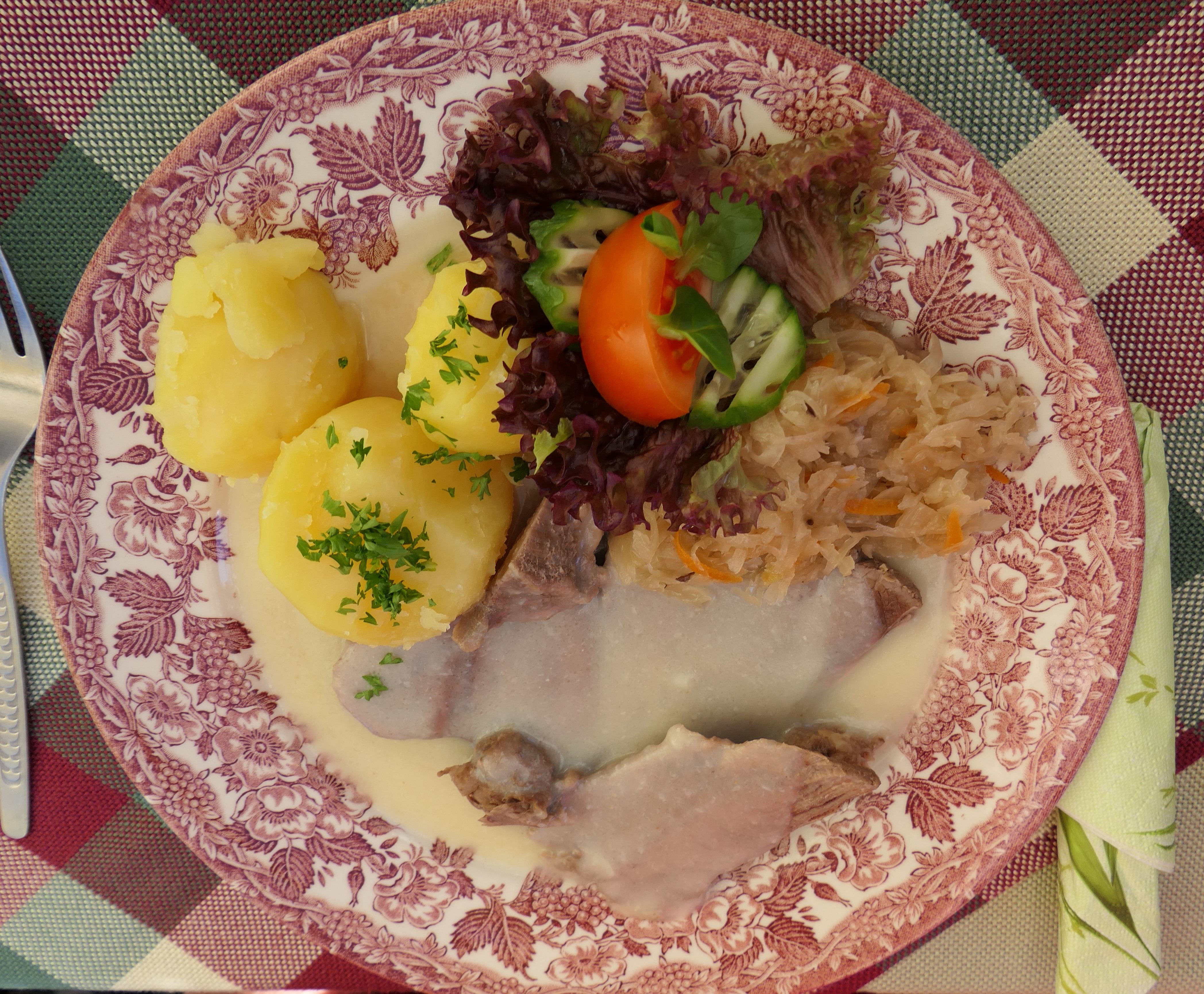 Tafelspitz in Meerrettich-Soße - Gericht im Gasthof "Zum Auer" in Moritzburg